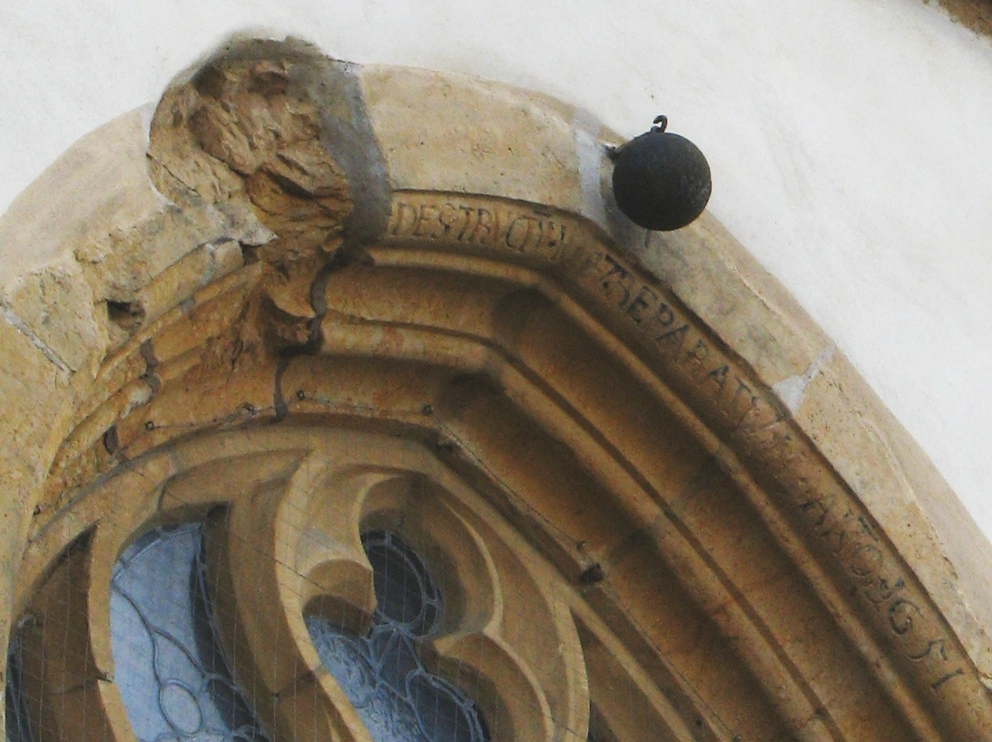 Schaden an der St. Aegidiuskirche durch Kanonenbeschuss im Dreißigjährigen Krieg